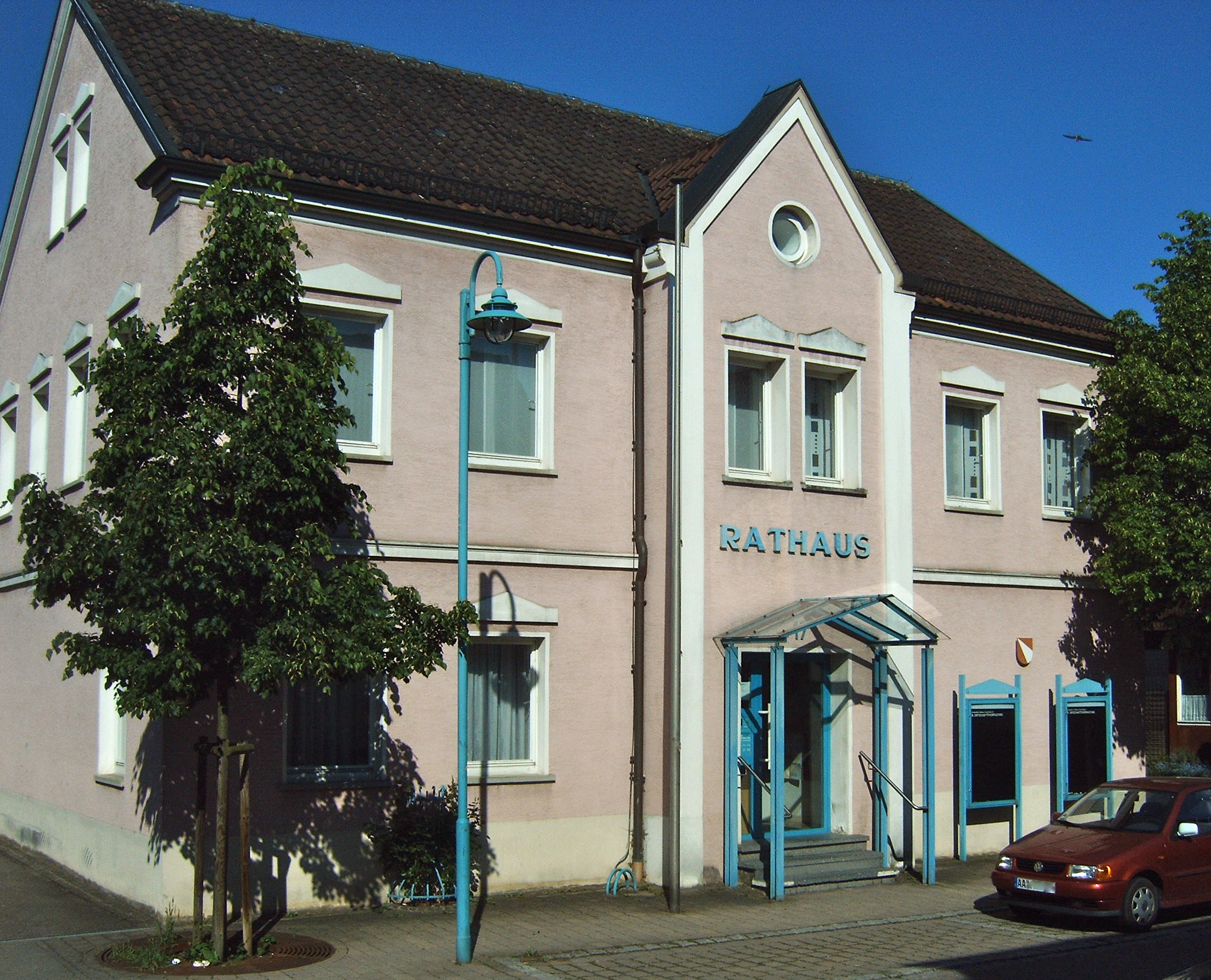 Rathaus der ehemaligen Gemeinde Waldhausen, ehem. Landkreis Schwäbisch Gmünd